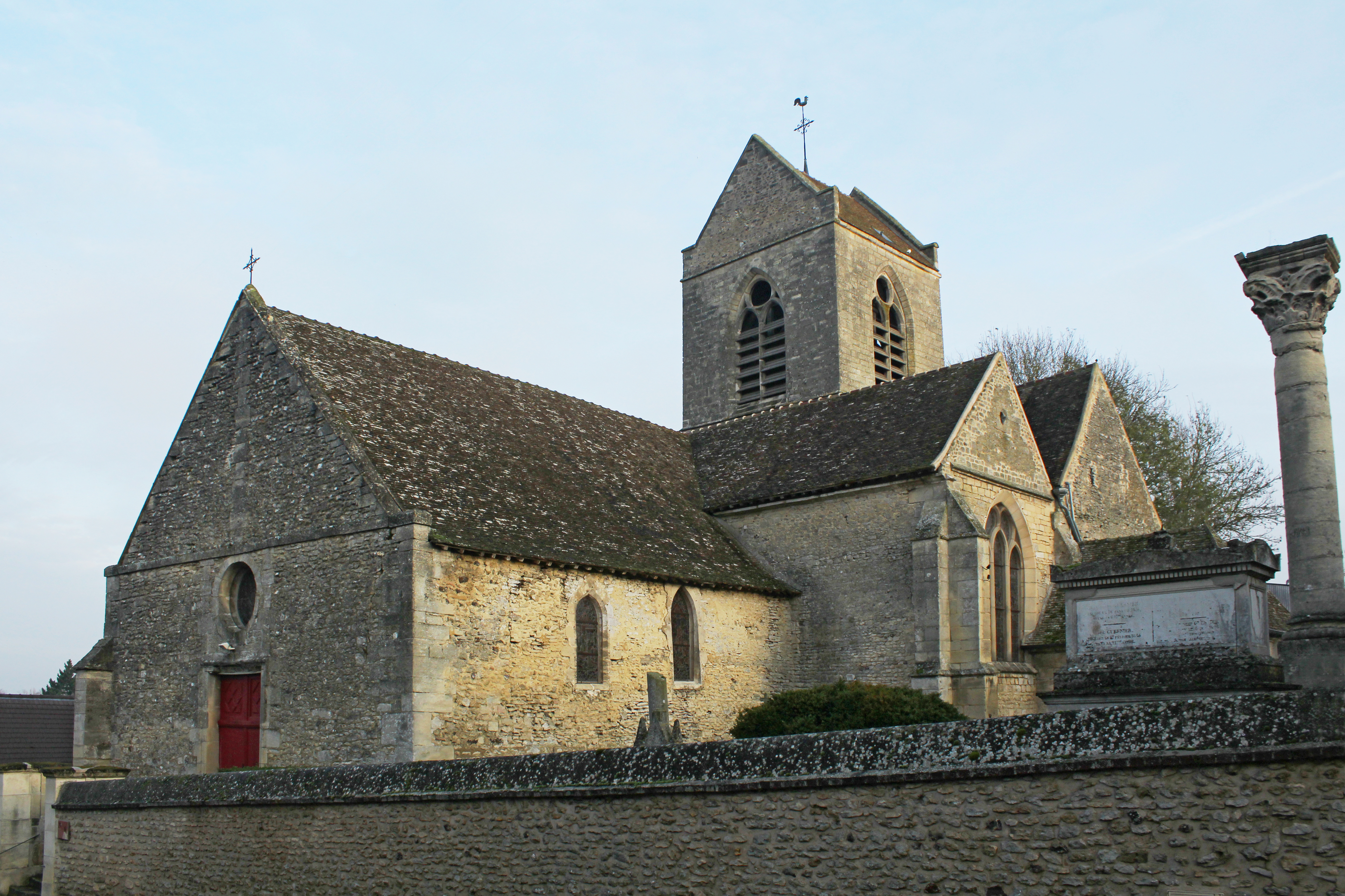 Église de Vesly (Eure)